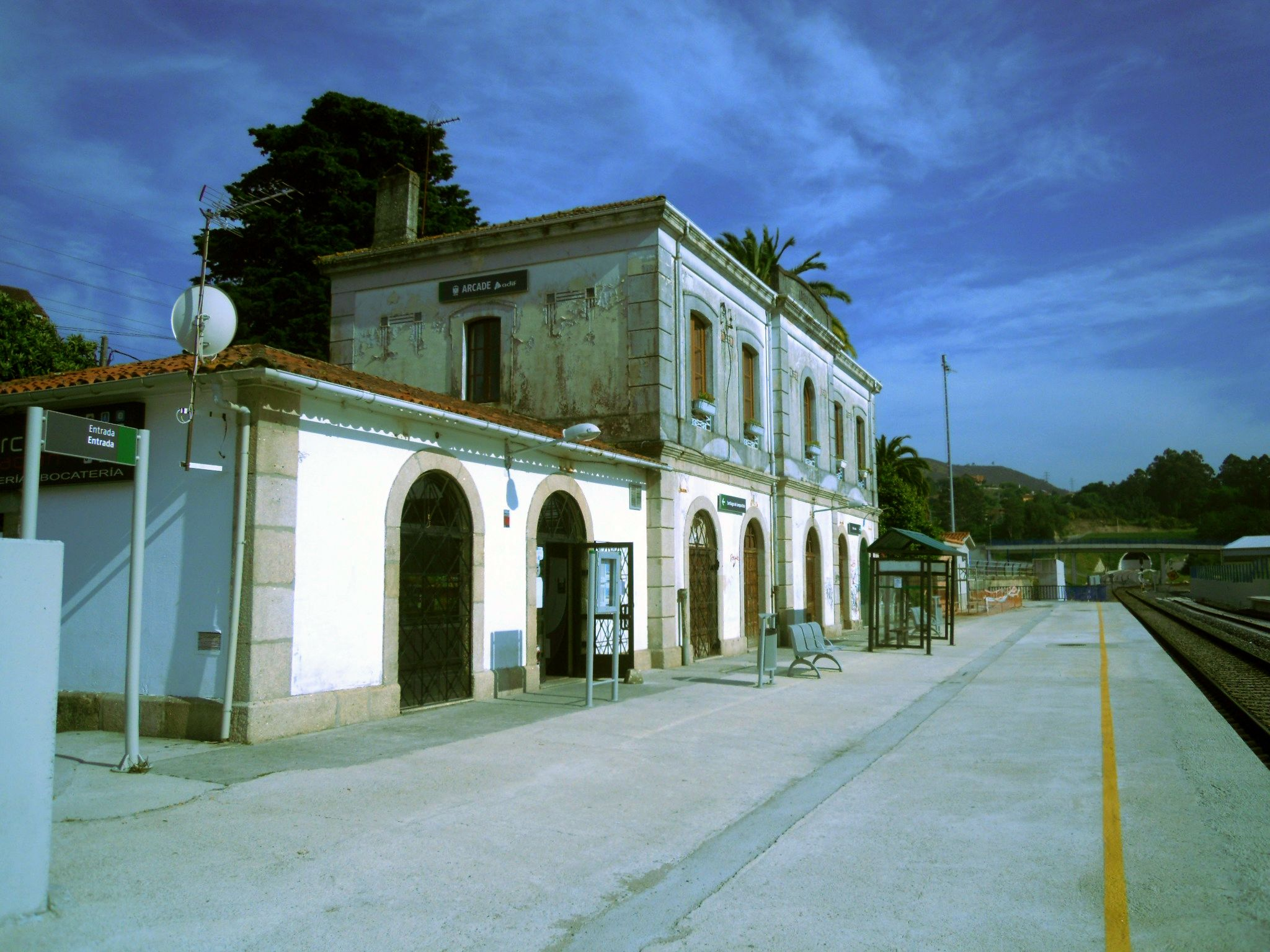 Estación de Arcade